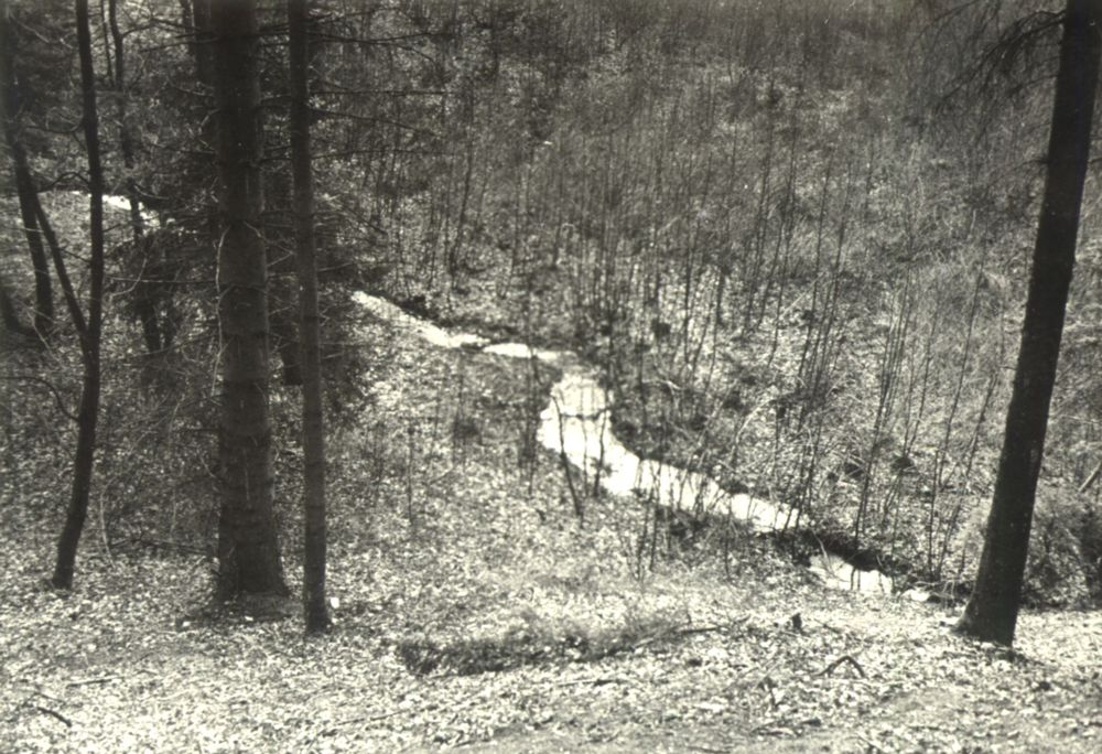 Der Große Dieckfluss oberhalb der Oldendorfer Schweiz im Quellbereich